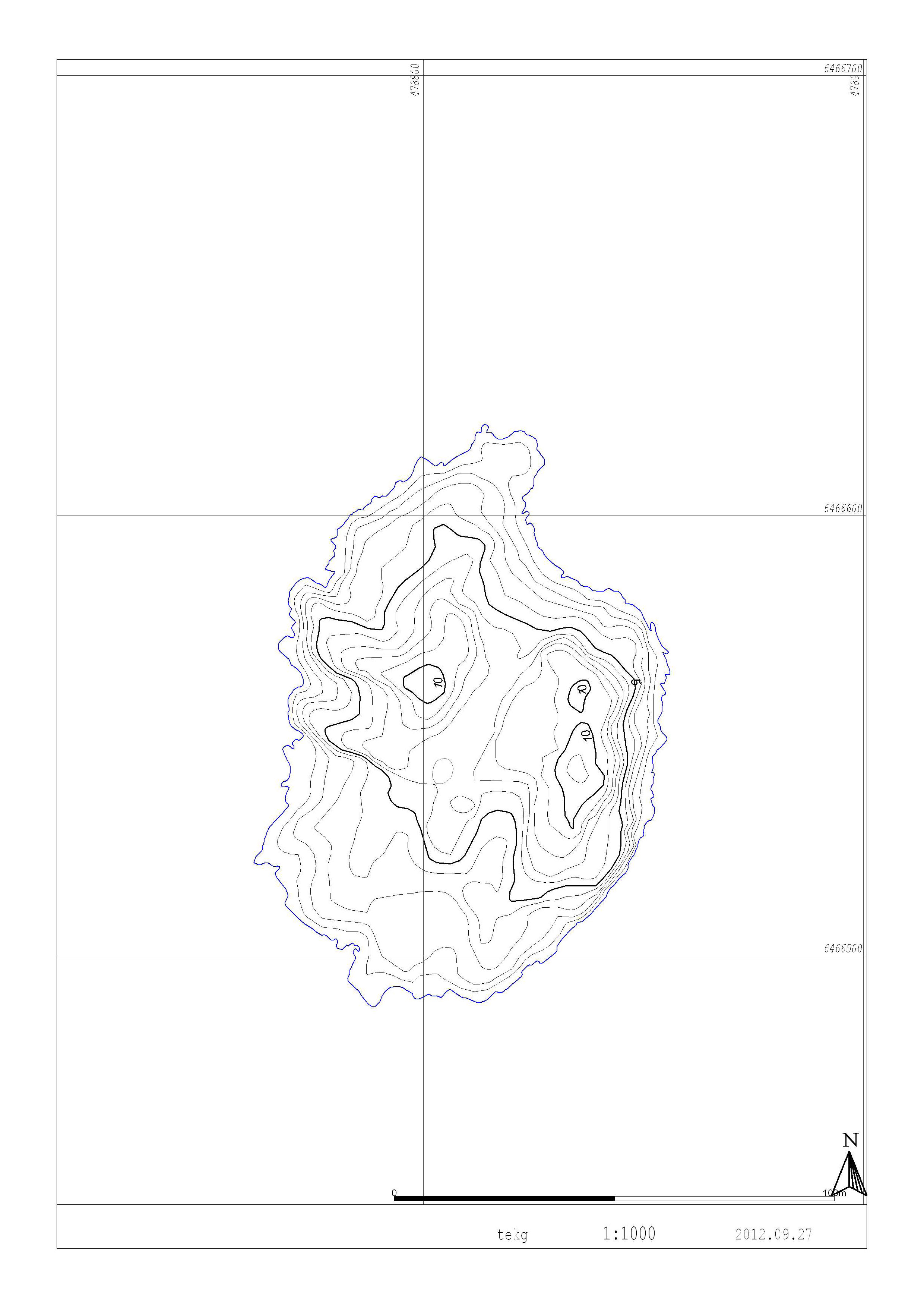 Kart i målestokk 1:1000 med 1 meters ekvidistanse og 5 meters tellekoter.